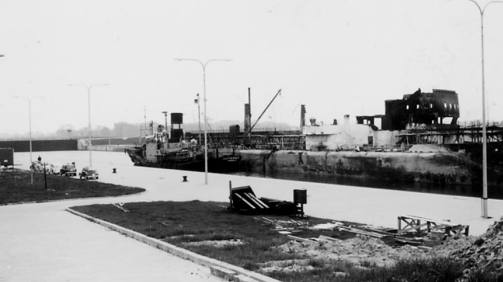 Anne Mildred Brovig 1, Kopie.jpg